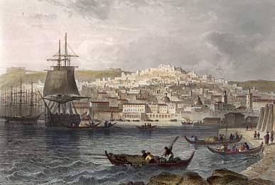 Photo montrant Alger du temps de la régence